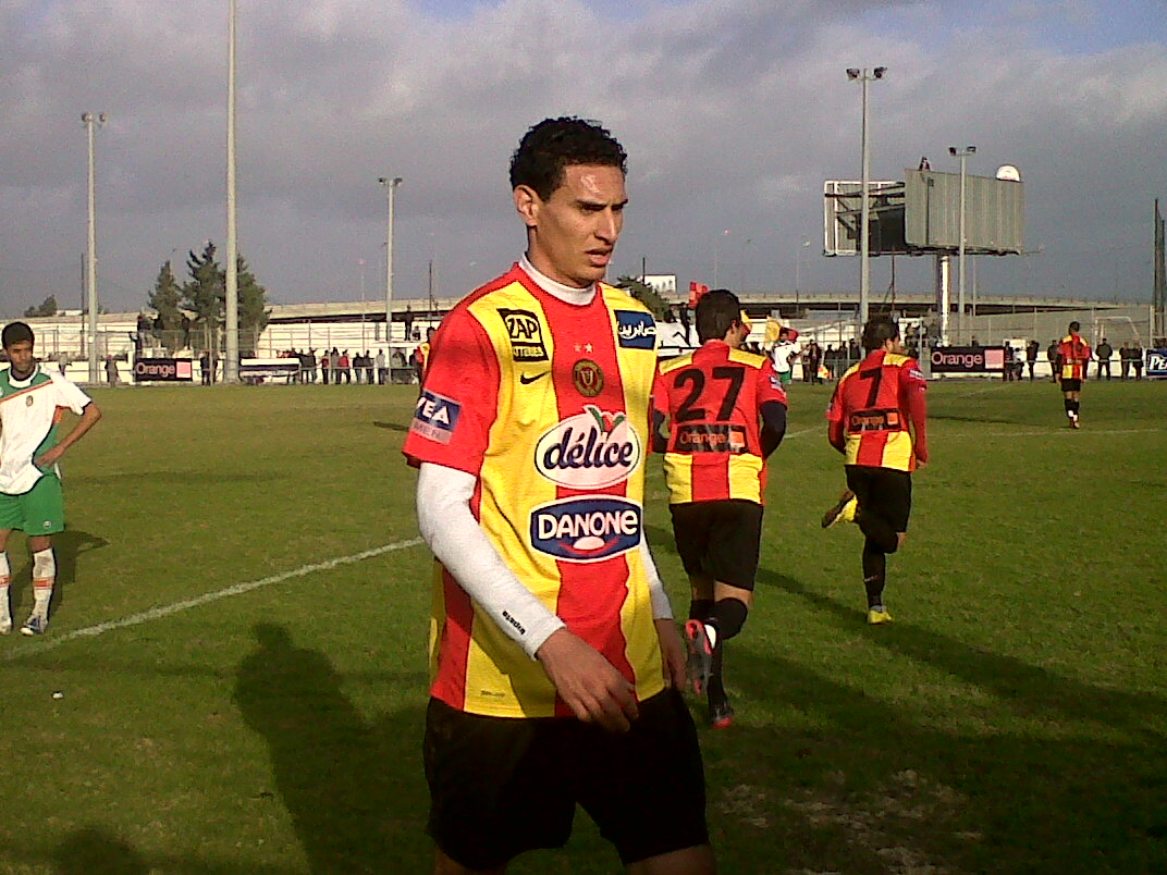 Karim Aouadhi